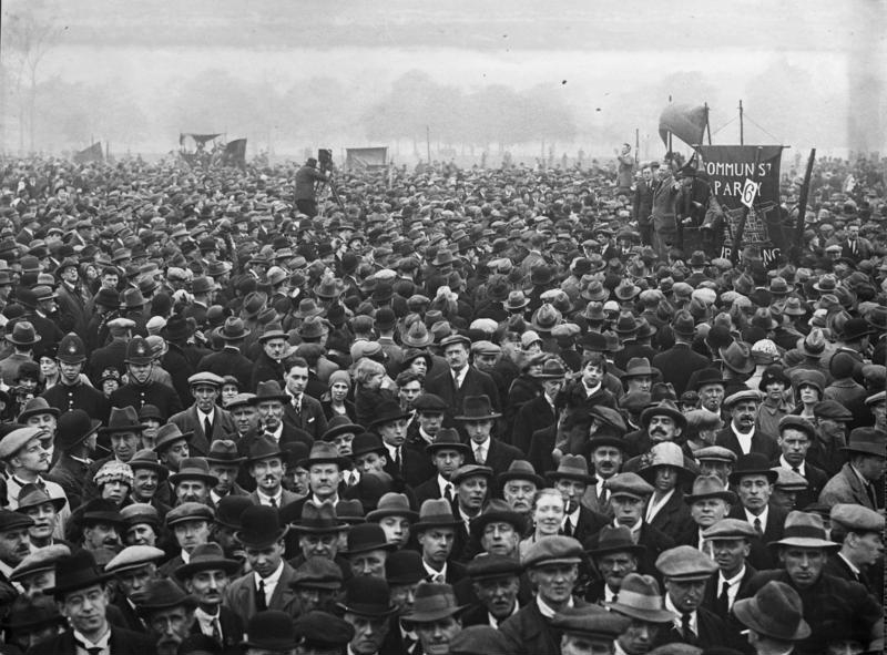 Mai-Feier in London! Blick auf die Menschenmenge während der Mai-Feier im Hydepark in London.